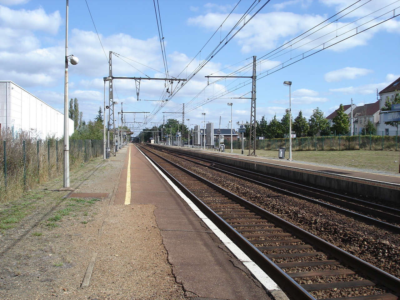 Gare des Essarts-le-Roi (78) : Vue en direction de Paris, du quai pour Paris-Montparnasse.